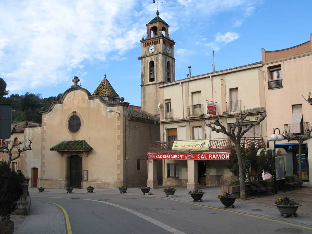 Plaça de Sant Llorenç Savall